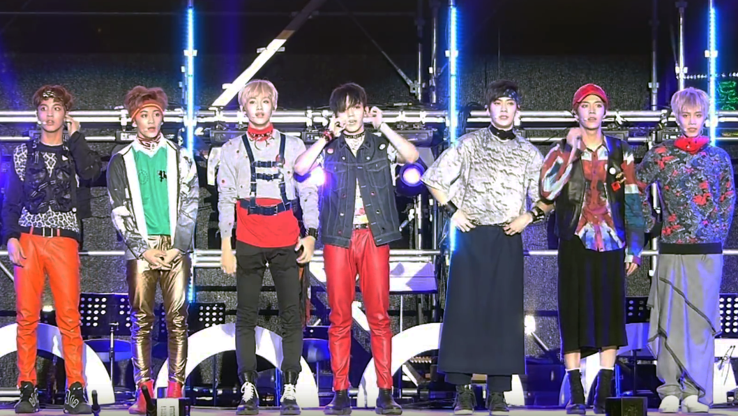 2016년 8월 20일 부산 현인가요제에서 NCT 127